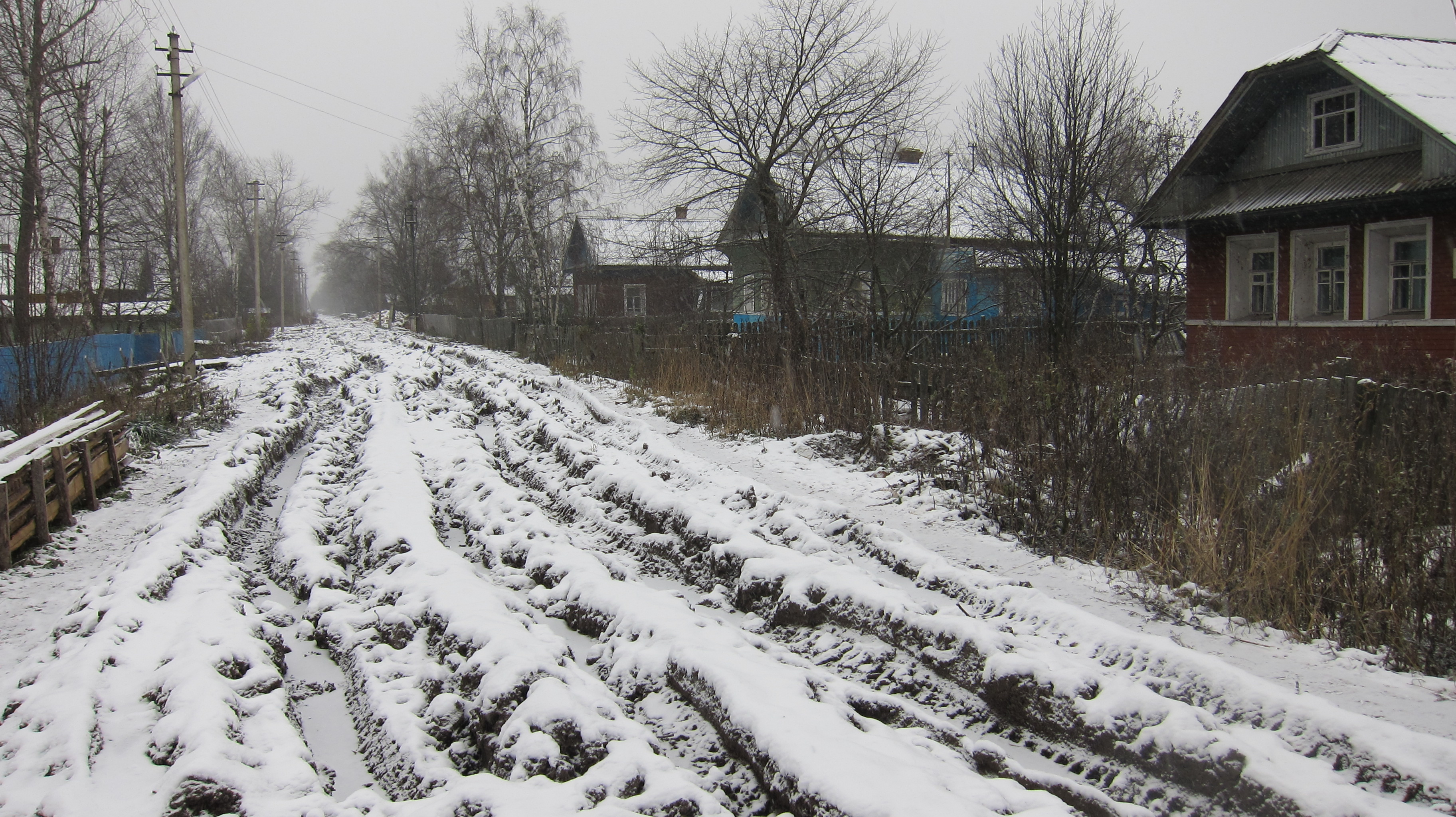 Улица Ворошилова. Сюда не могут проехать ни врачи скорой помощи, ни пожарная служба, ни милиция, ни мэр города. Дети в школу идут сначала по непроходимой грязи, потом через железнодорожные пути.